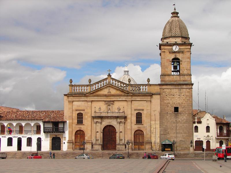 Catedral de Tunja, Catedral de Tunja, Boyacá